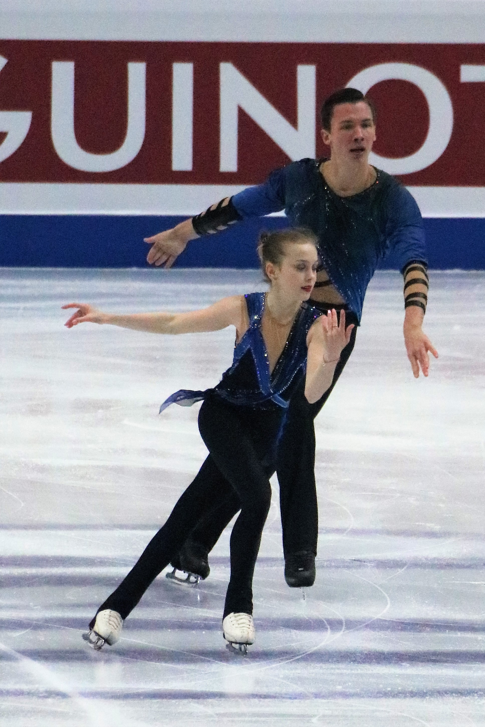 Юлия Артемьева / Михаил Назарычев (Россия) на финале юниорского Гран-при 2019-2020